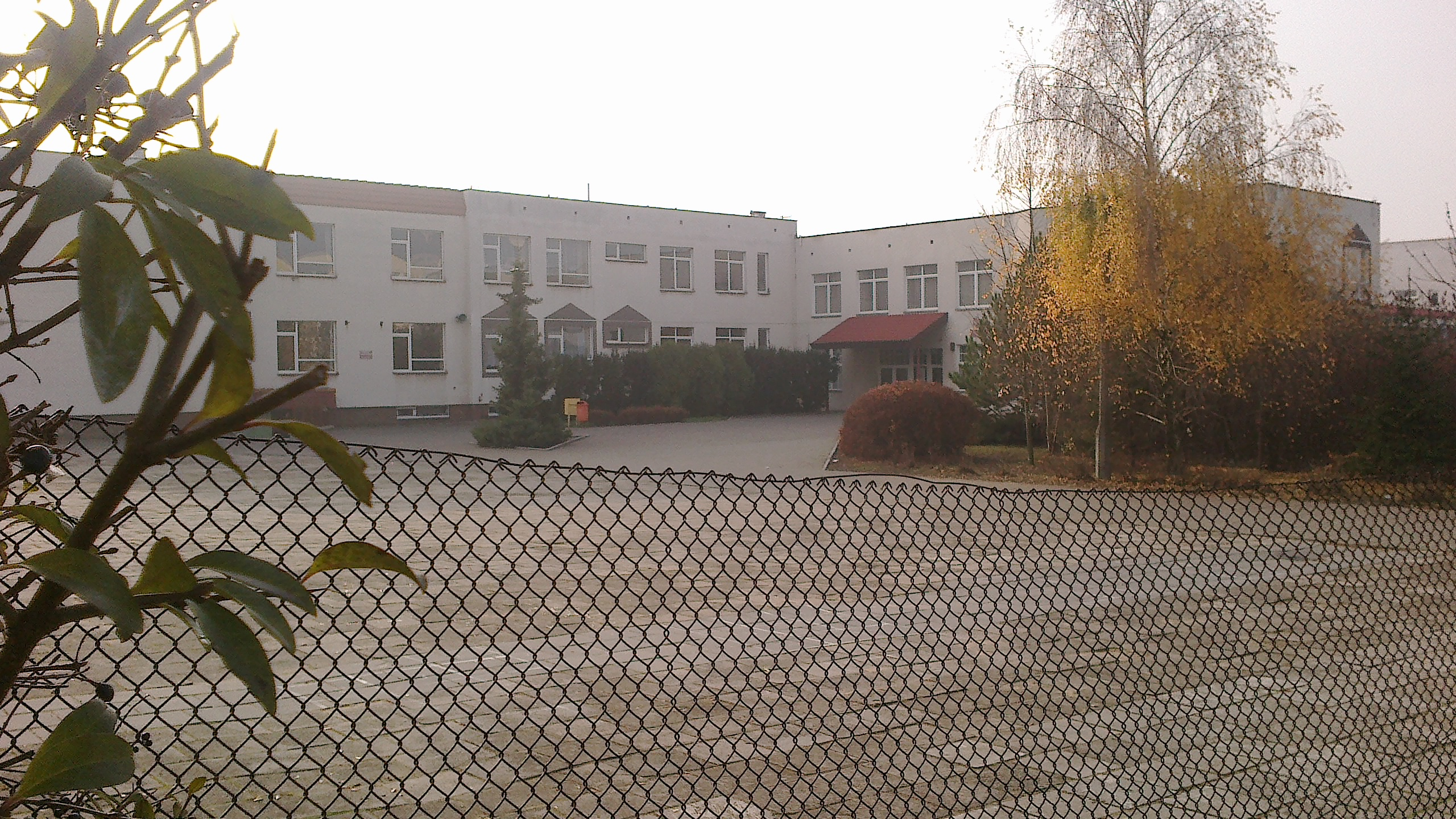 Szkoła Podstawowa w Janikowie